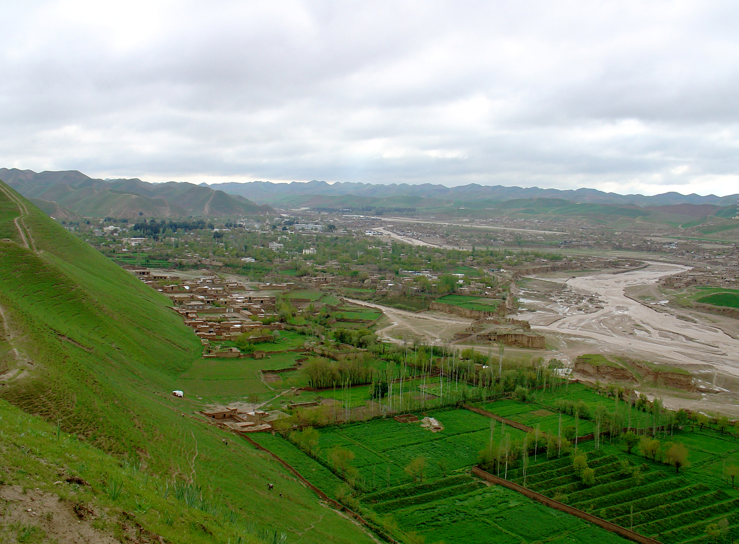 Qala-I-Naw